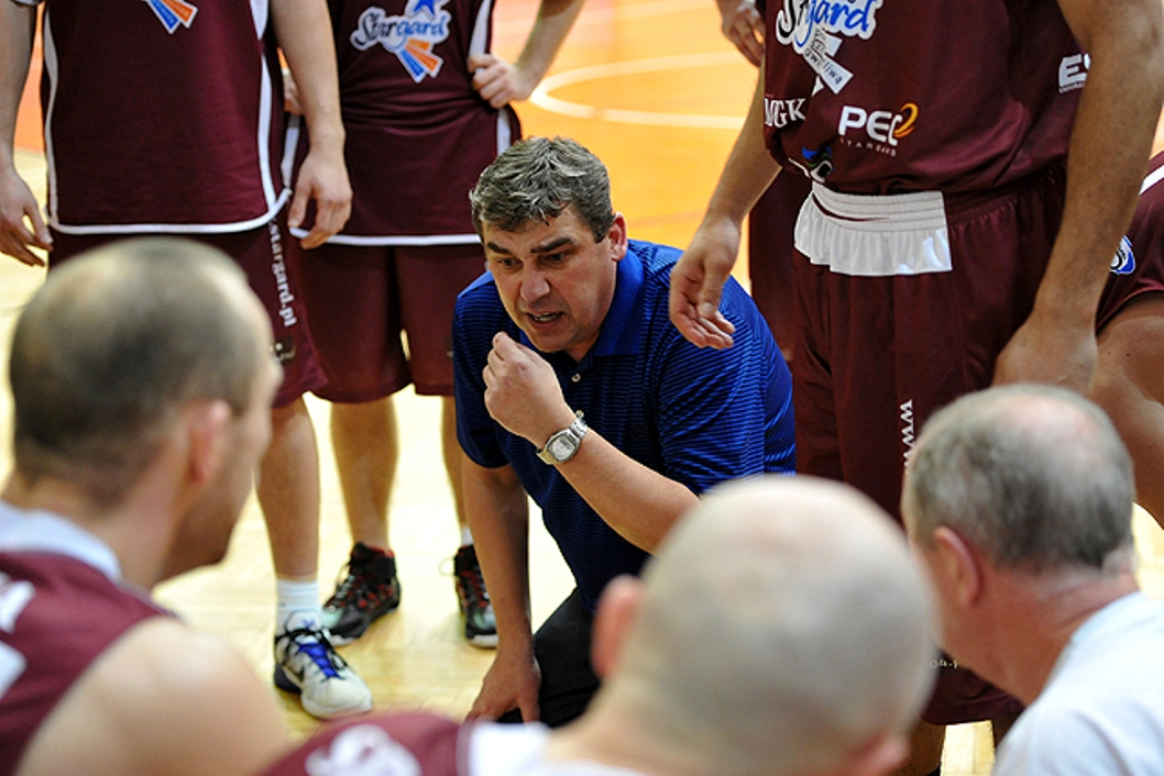 Stargard, 2013r. Trener Spójni Stargard Ireneusz Purwiniecki